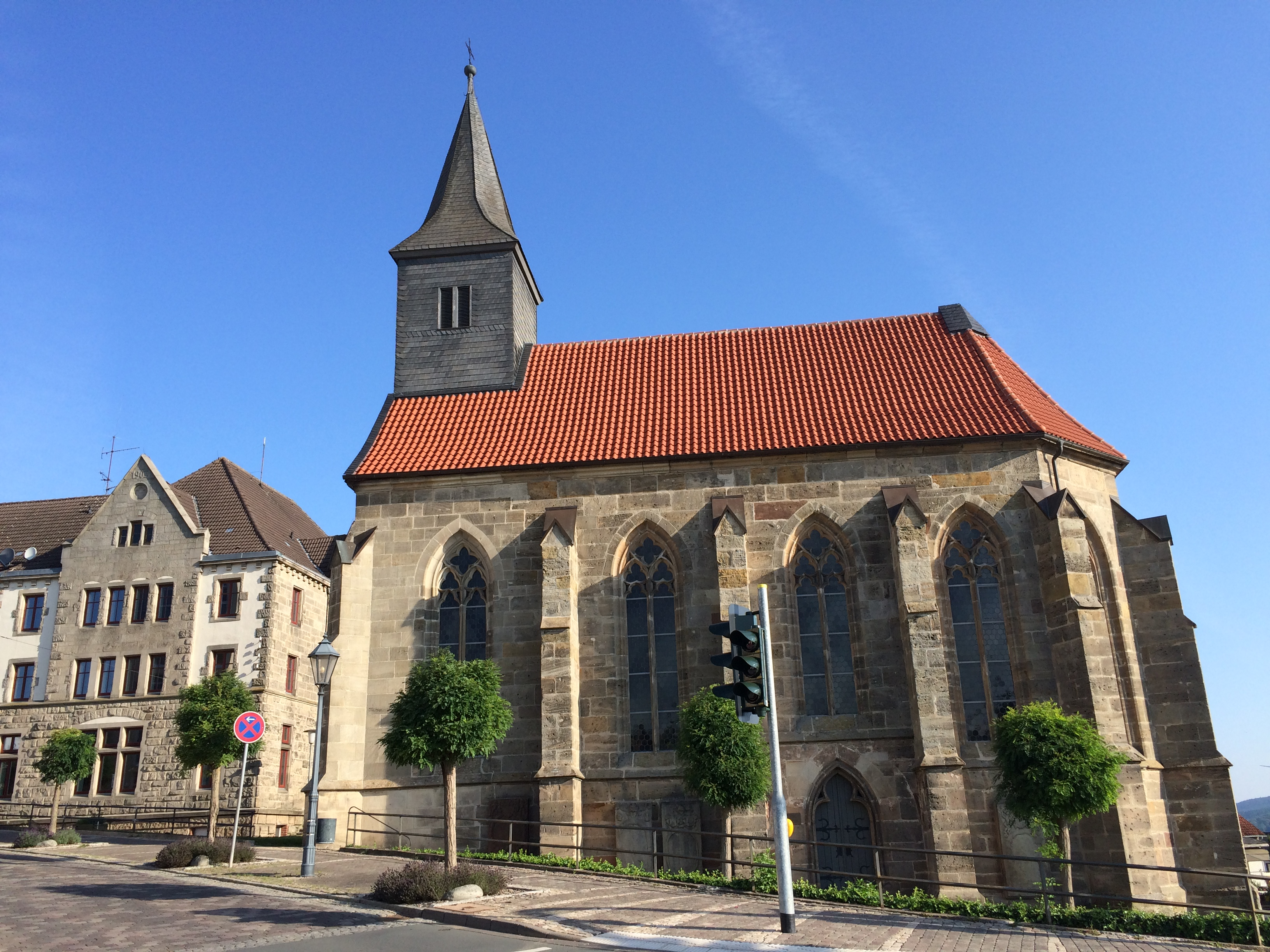 Die Hospitalkapelle, auch Friedhofskapelle, in Wolfhagen an der Kreuzung Wilhelmstraße / Kurfürstenstraße